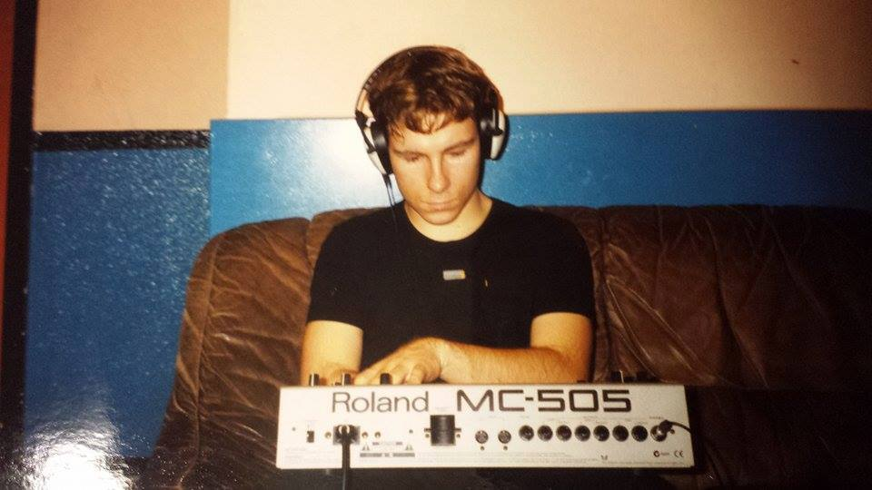 Sascha Ende 2001 mit einer Roland MC505